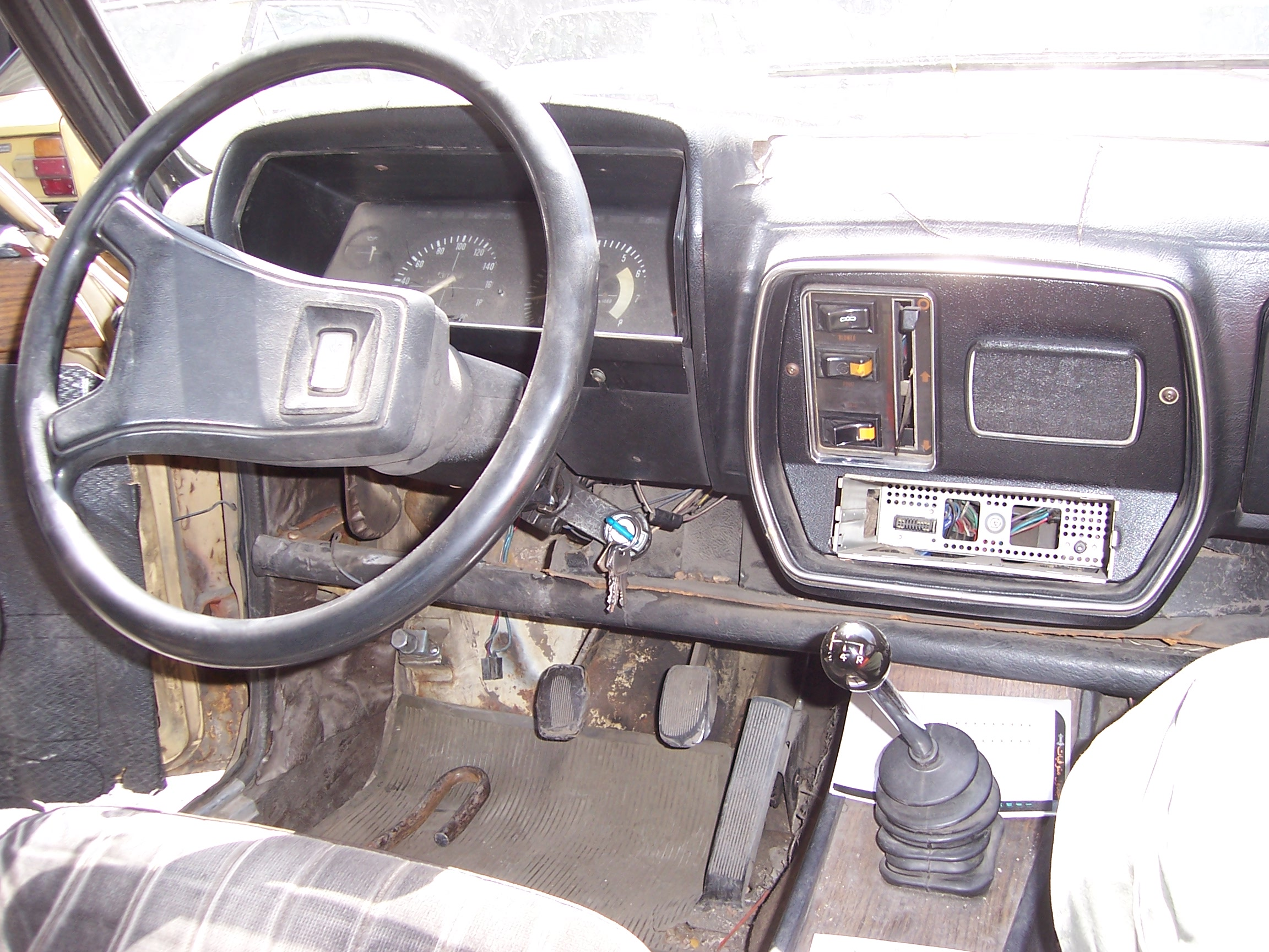 Innenansicht eines Paykan